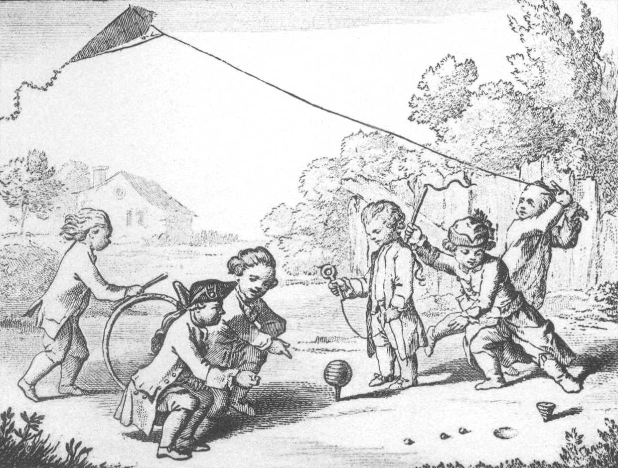 Andere Vergnügungen der Kinder. c) Der Reifen, der Brummkreisel, der Kreisel, der Drachen. (Beschreibung lt. Quelle)